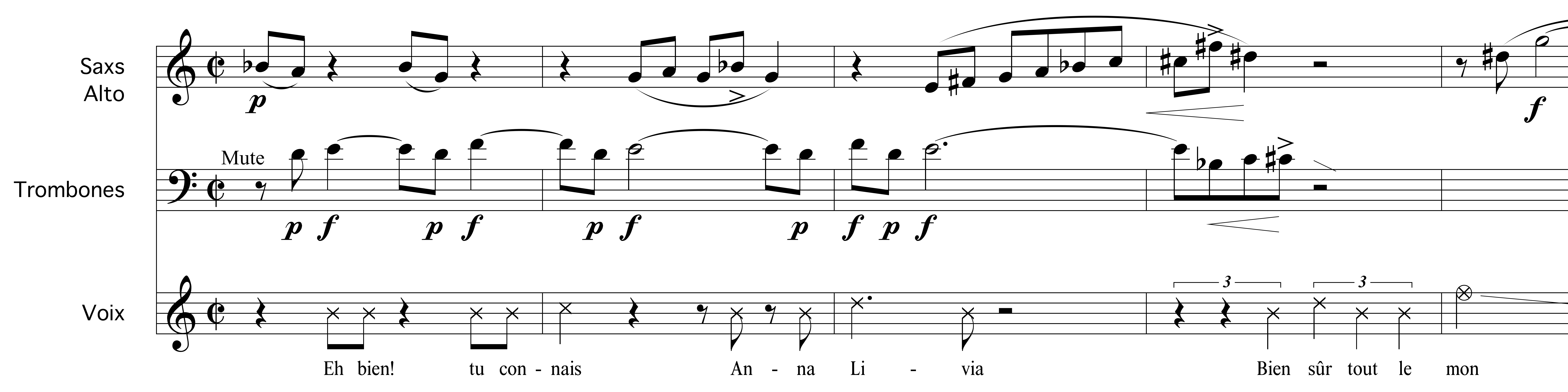 Extrait de la pièce II d'Anna Livia Plurabelle d'André Hodeir